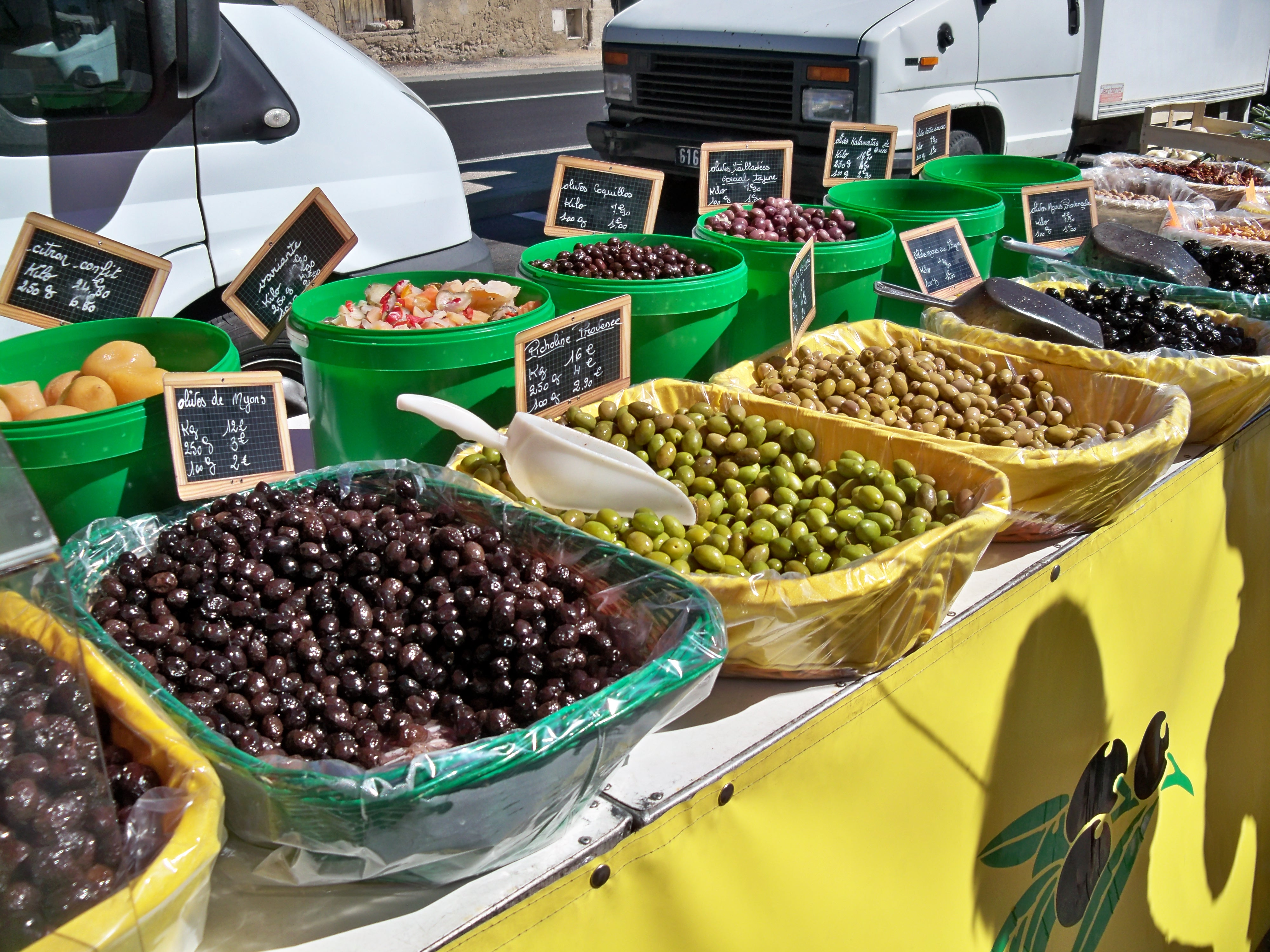 Picholines et Olives de Nyons sur un marché gardois